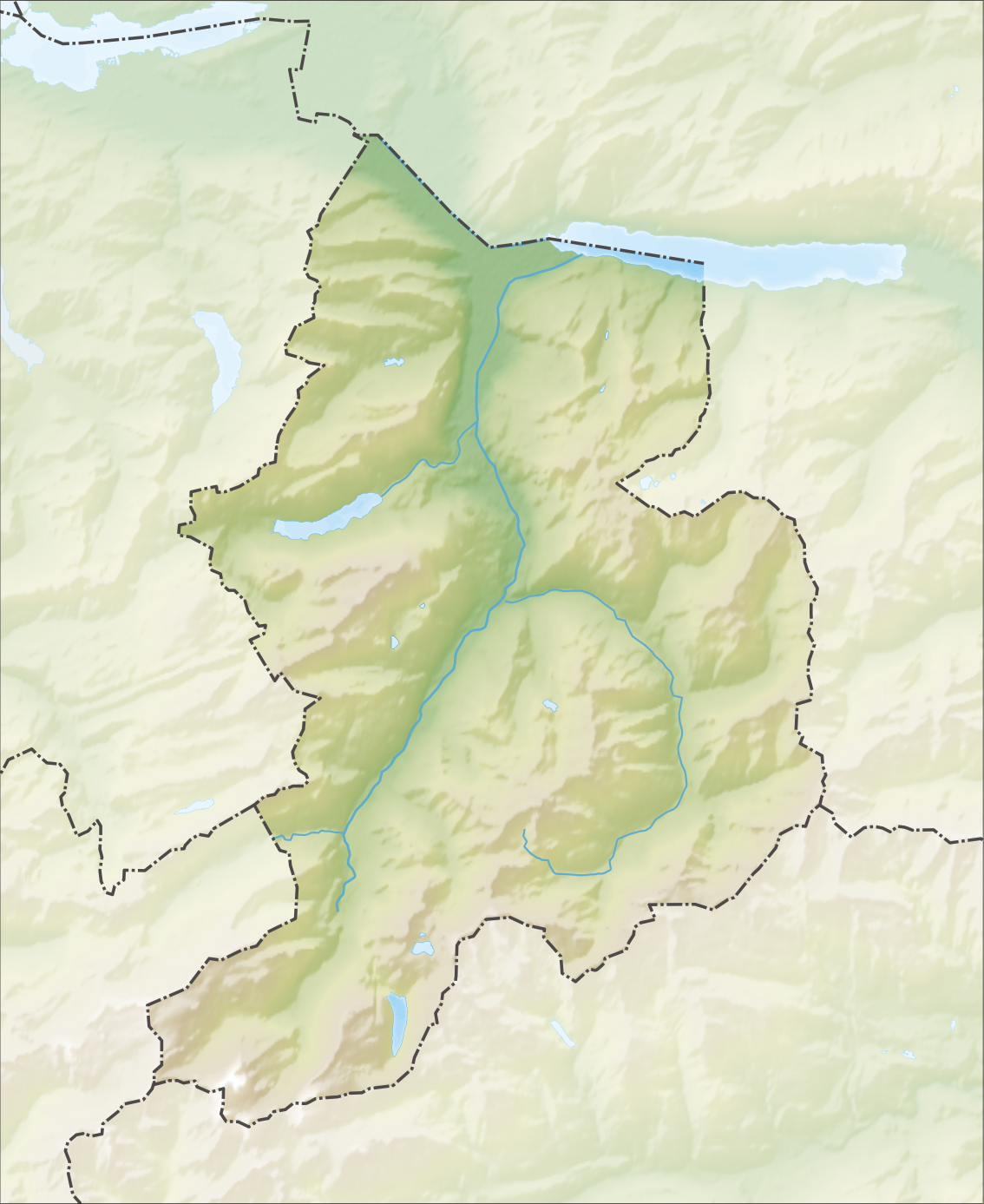 Reliefkarte des Kantons Glarus Topographischer Hintergrund: NASA Shuttle Radar Topography Mission (public domain). SRTM3 v.2.